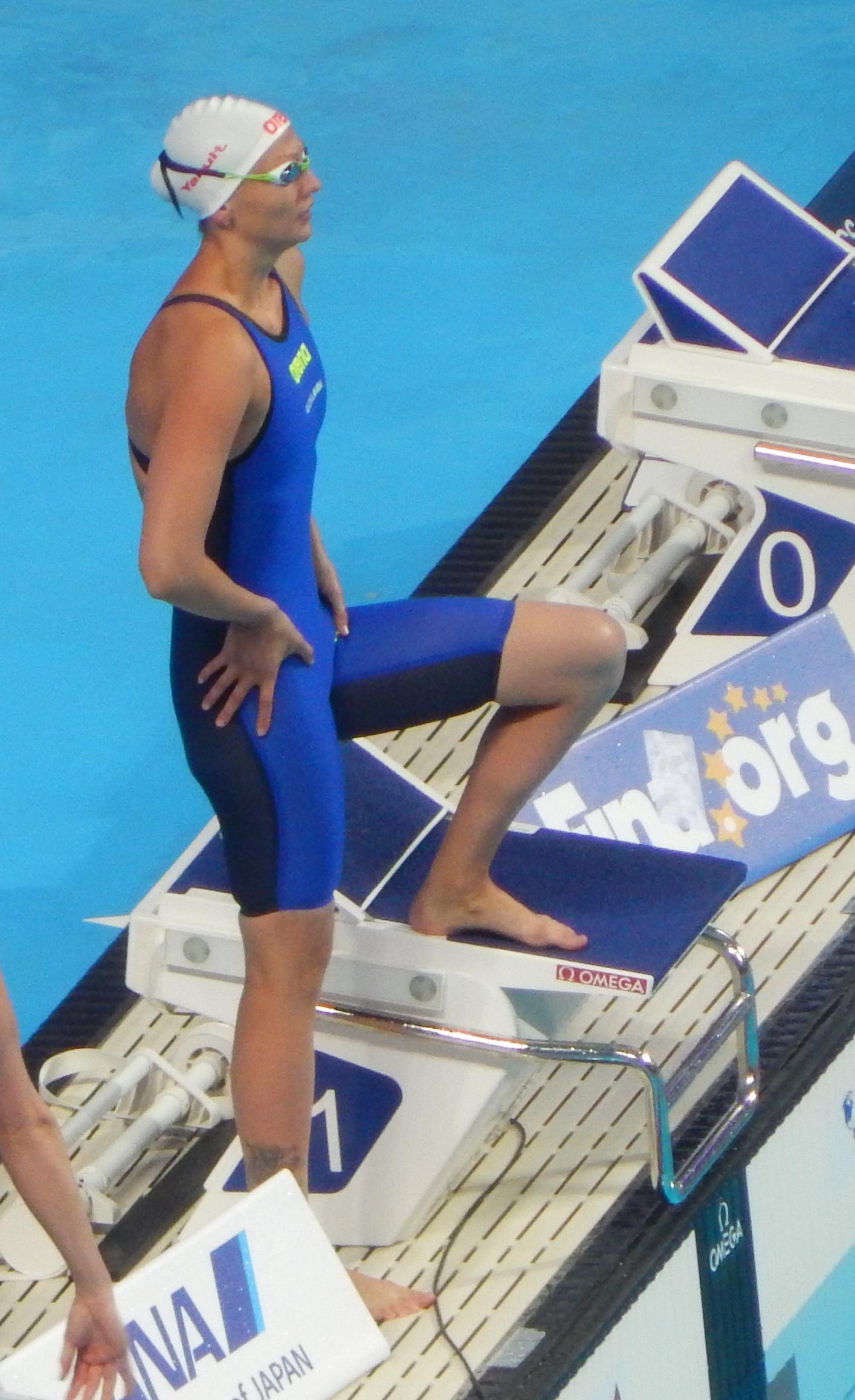 Виктория Андреева на чемпионате мира в Казани (полуфинал 200 метров в/с)